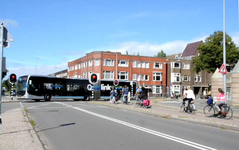 Twee licht verkeerslicht bij Kapteinbrug en Busbaan Oosterhamrikkade te Groningen.